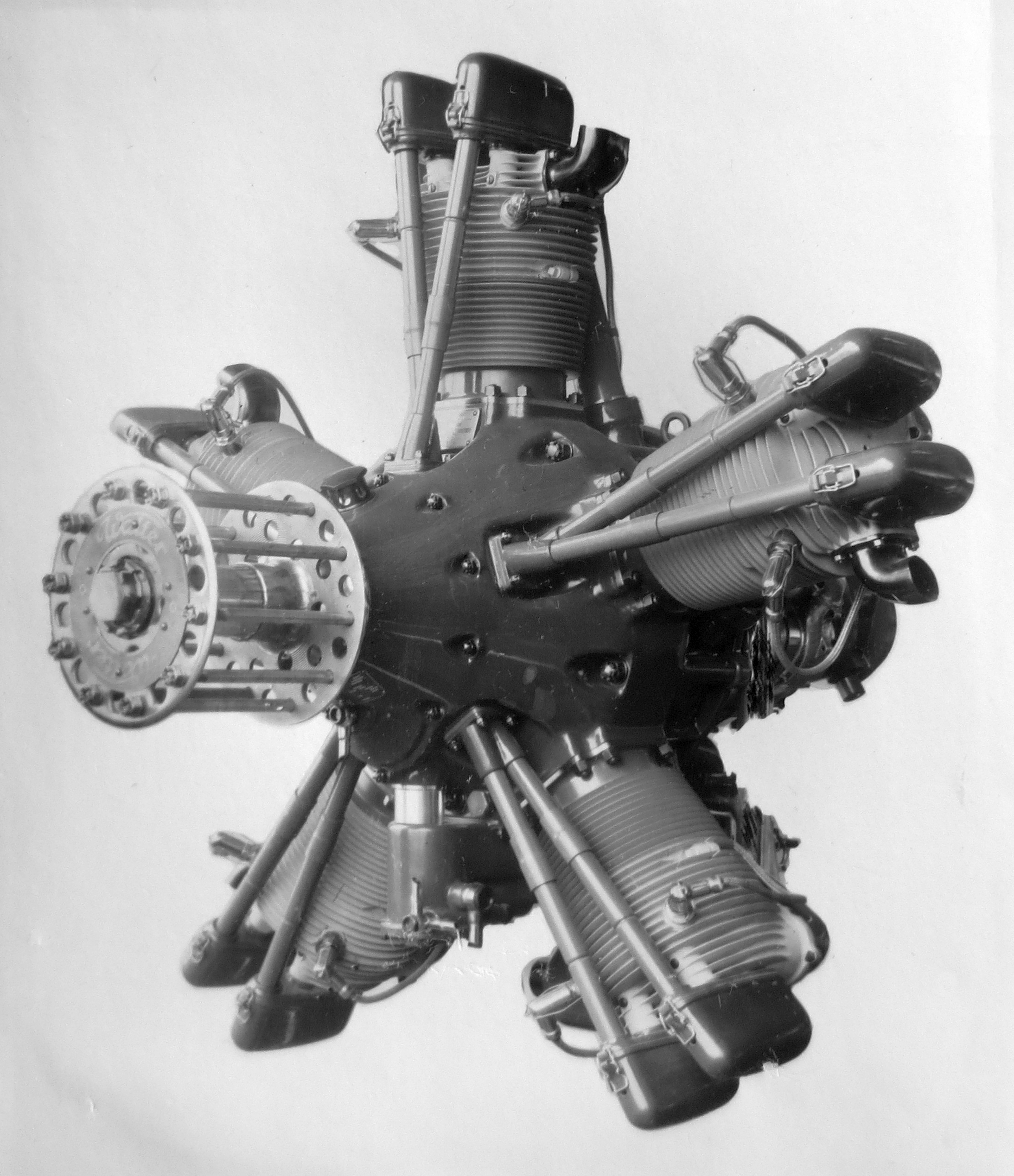 letecký motor Walter Regulus II (1934)